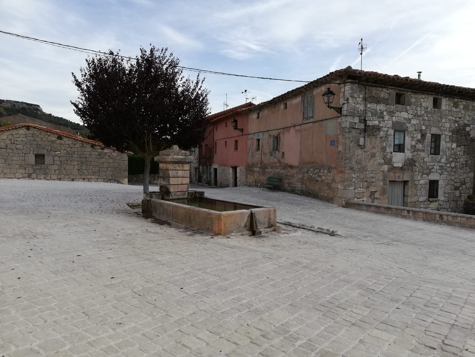 Fuenta en la Plaza de la Constitución de Santa Olalla de Bureba, Burgos